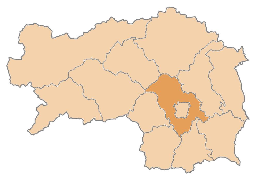 Karte: politischer Bezirk Graz-Umgebung Lizenz: GFDL Quelle: Zeichnung plp Datum: de:2004 Ort: Wien